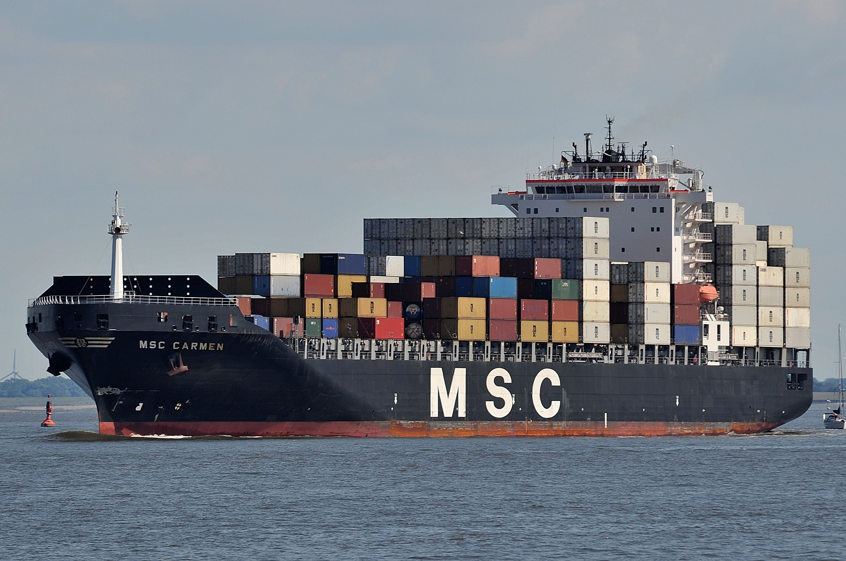 Von Hamburg kommend vor Cuxhaven in richtung See